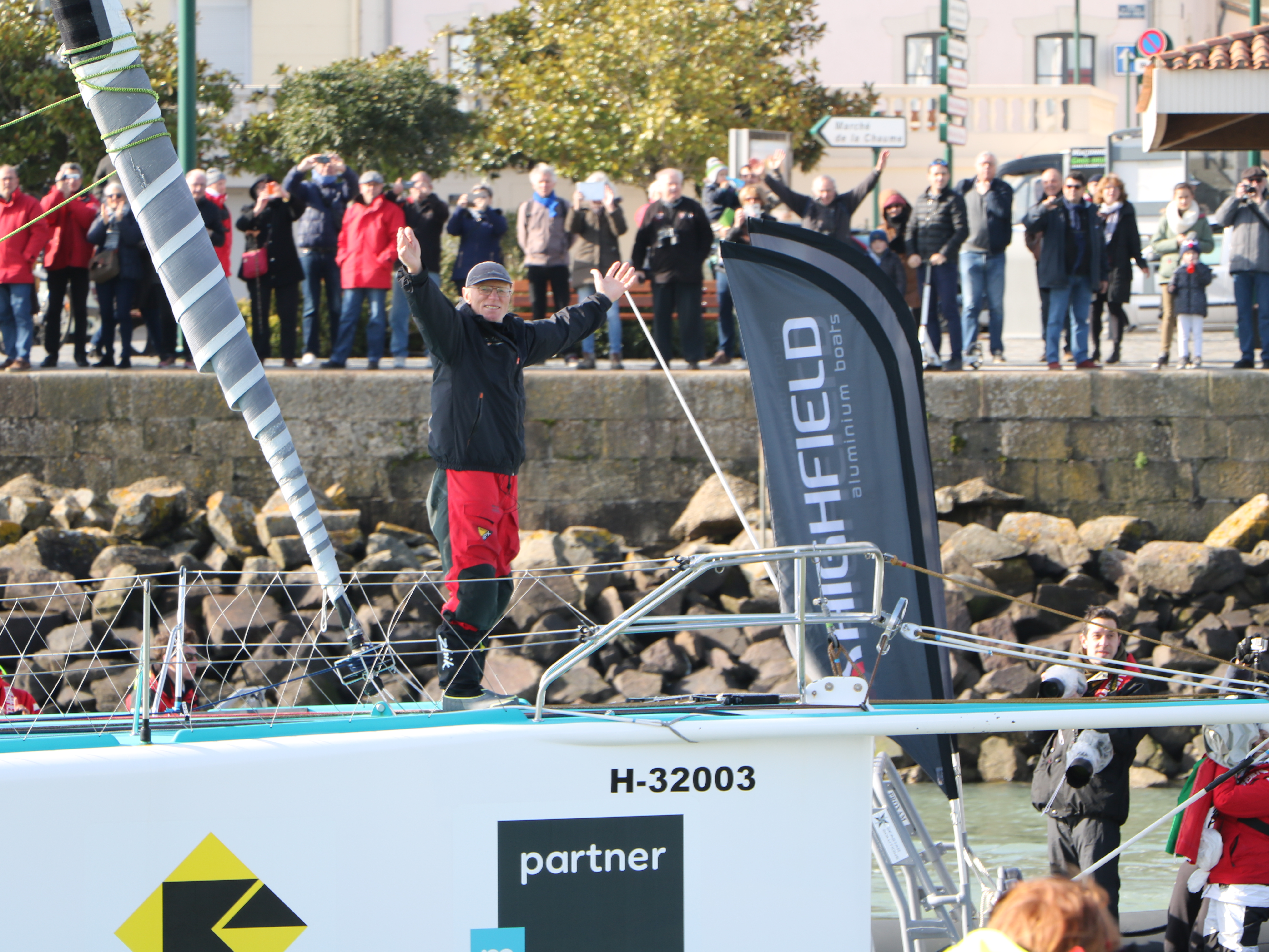 Arrivée de Nandor Fa Lors du Vendée Globe 2016-2017